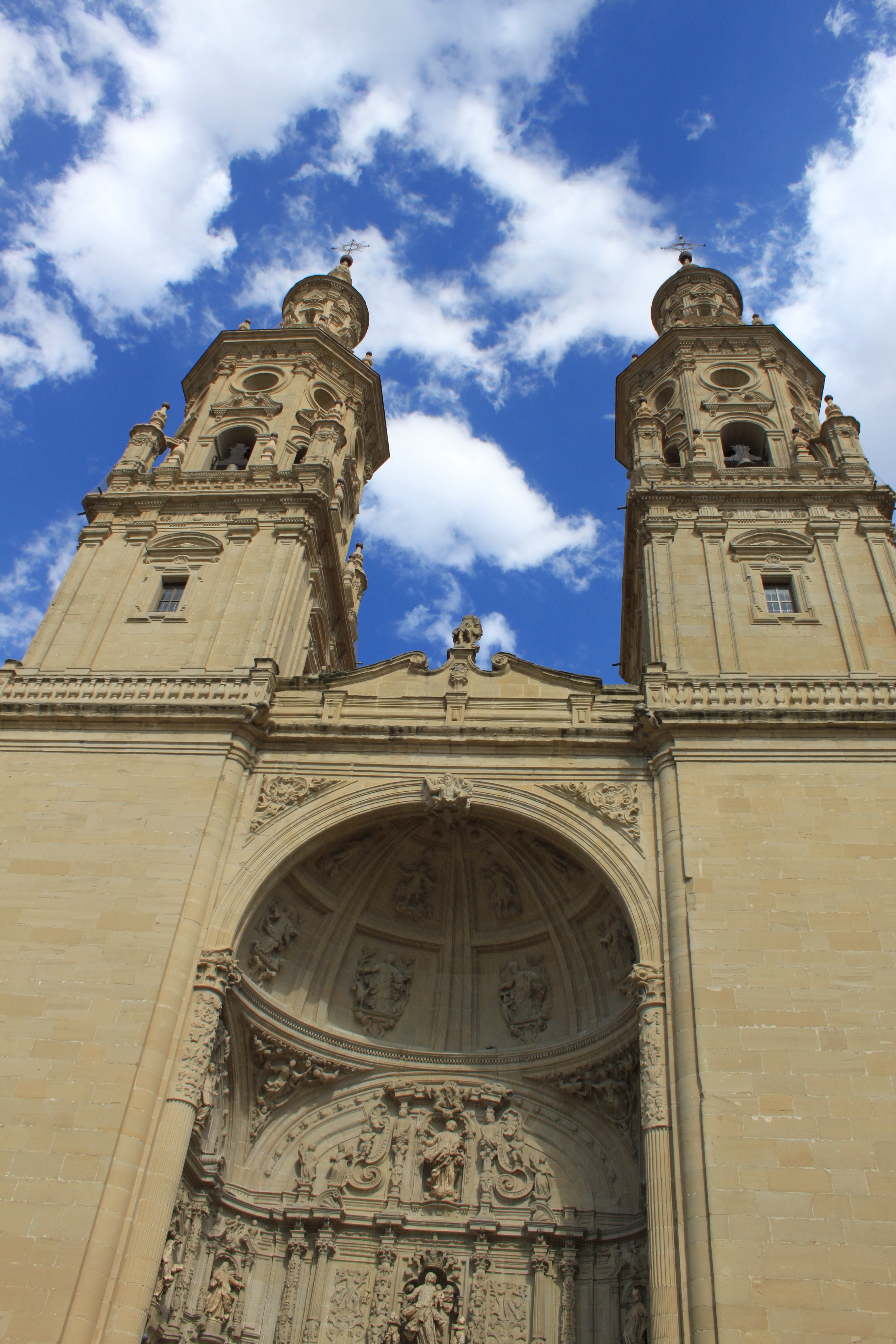 esta fotografia fue tomada una tarde de paseo por el centro antiguo de logroño.